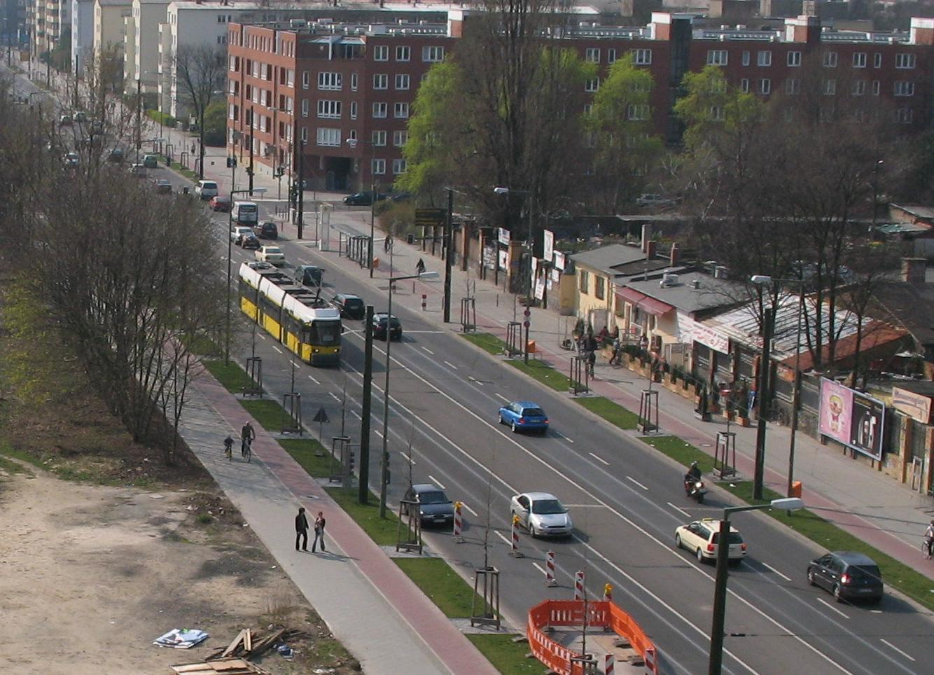 A GT6N tram (Line M10) in Bernauer Straße, Berlin, close to the junction point between Bernauer Straße and Eberswalder Straße. The tram runs between the stops "Wolliner Straße" and "Friedrich-Ludwig-Jahn-Sportpark" (Picture of March 31, 2007)